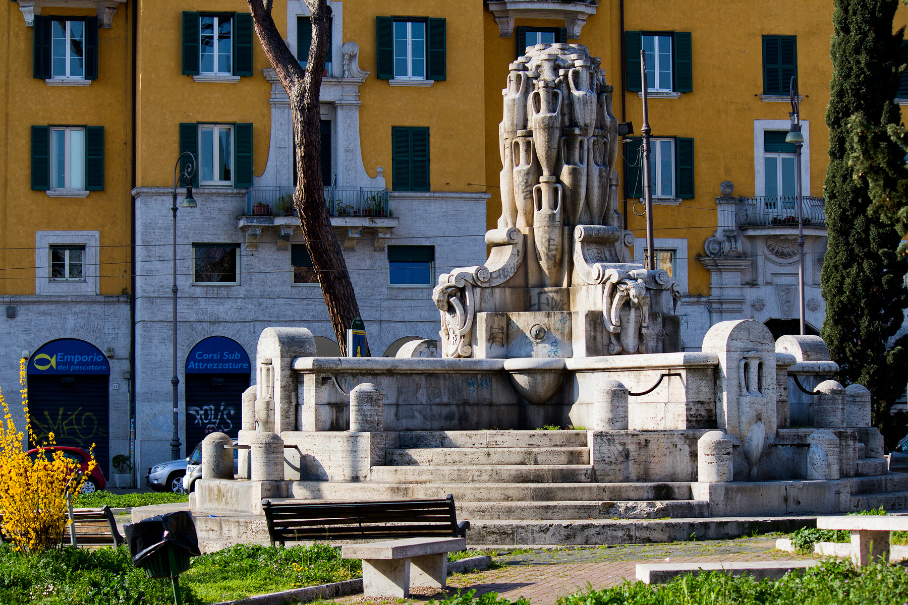 Fontana delle Anfore This is a photo of a monument which is part of cultural heritage of Italy.